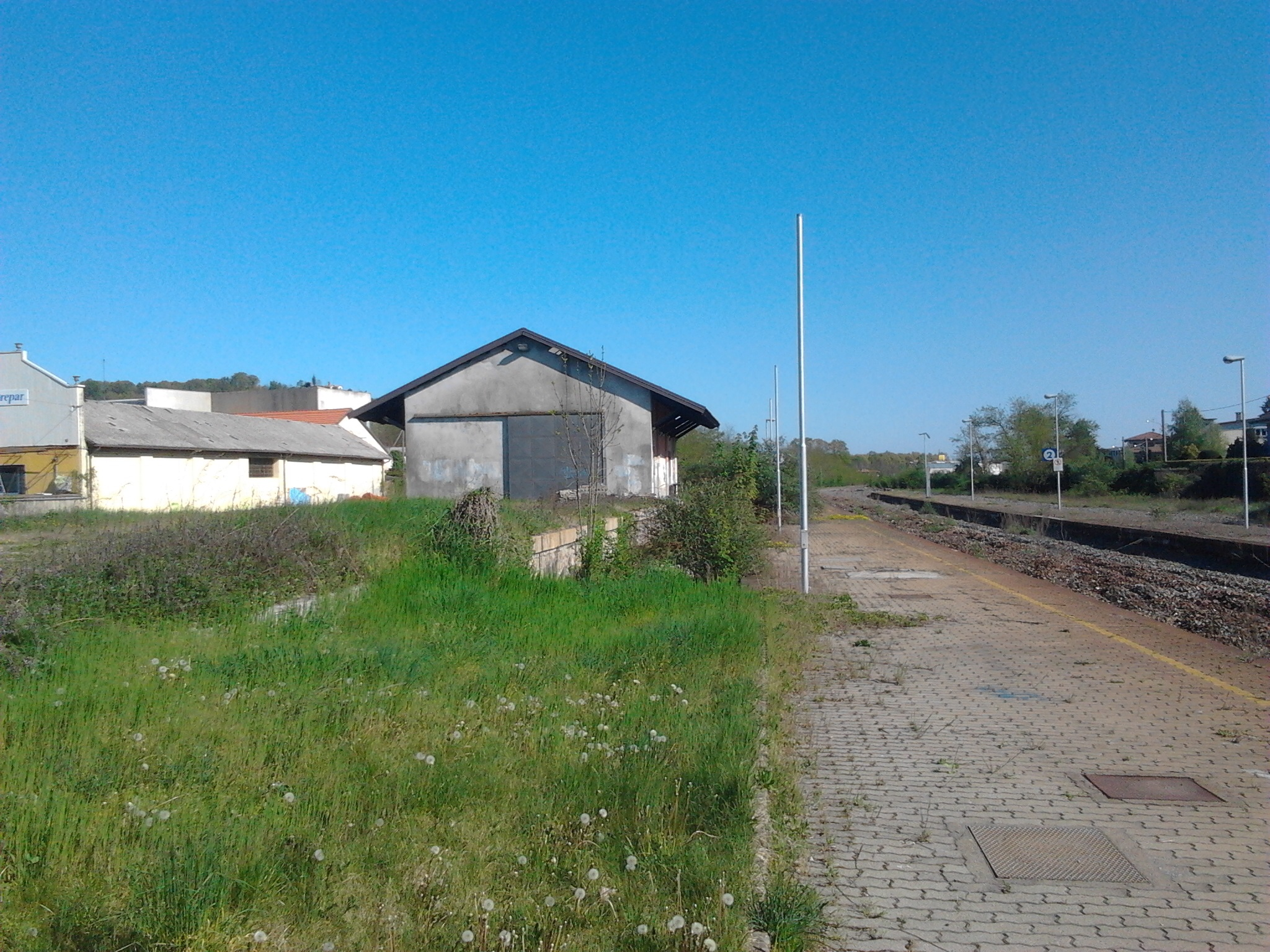 Fabbricato merci dismesso gozzano